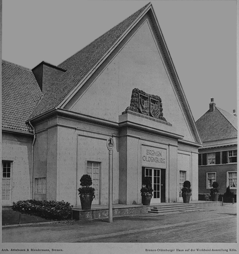 Bremen-Oldenburger Haus auf der Werkbundausstellung in Köln 1914 nach Entwurf der Architektengemeinschaft Abbehusen und Blendermann